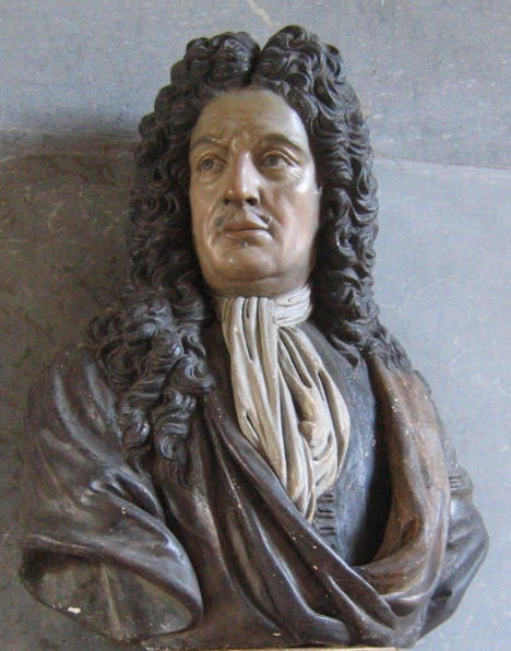 Georg Wilhelm von Brandenburg-Bayreuth Markgraf